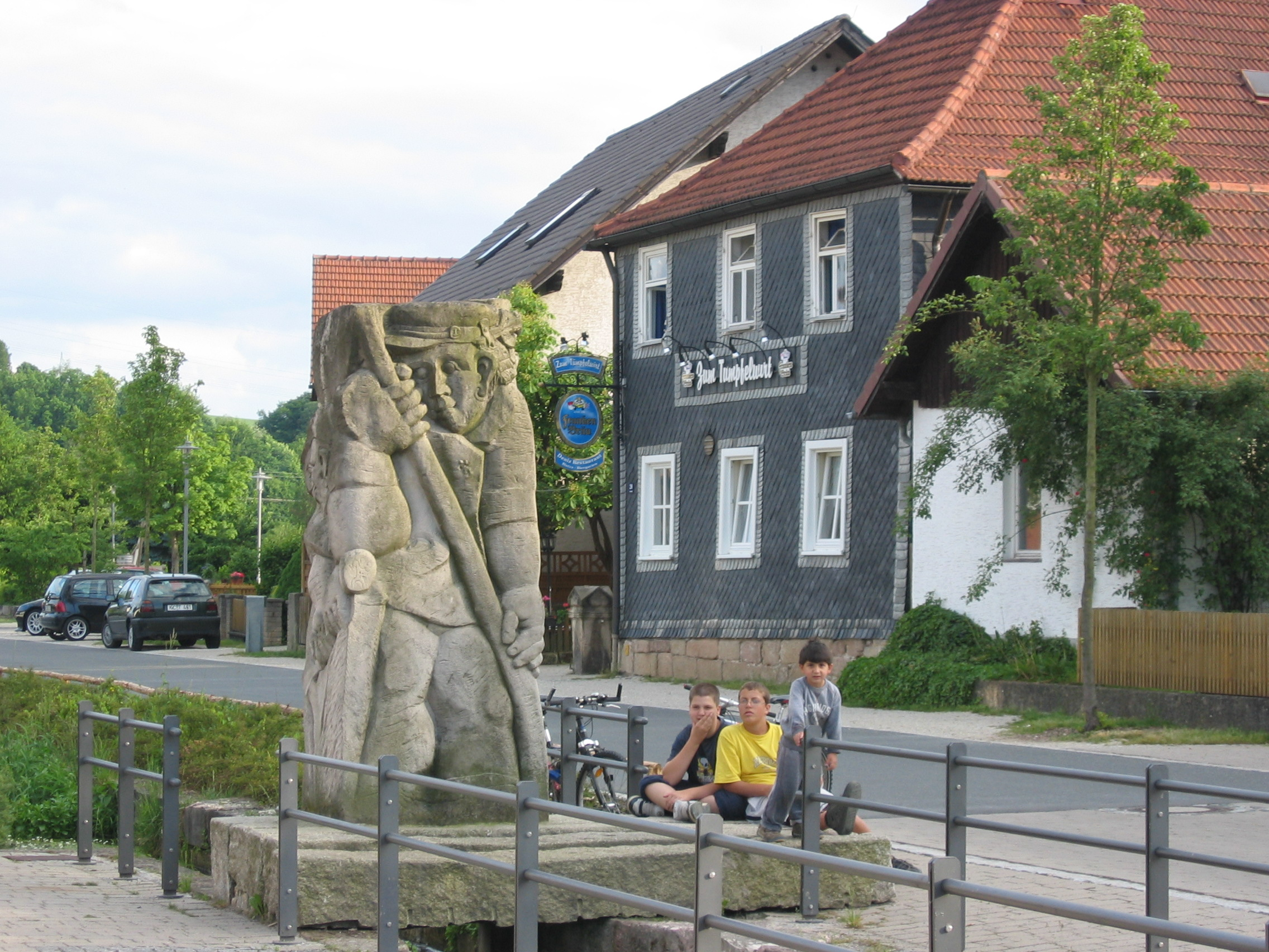 Neuses bei Kronach, Flößerbrunnen von Heinrich Schreiber